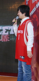 NBA 스트리트 온라인 기자간담회